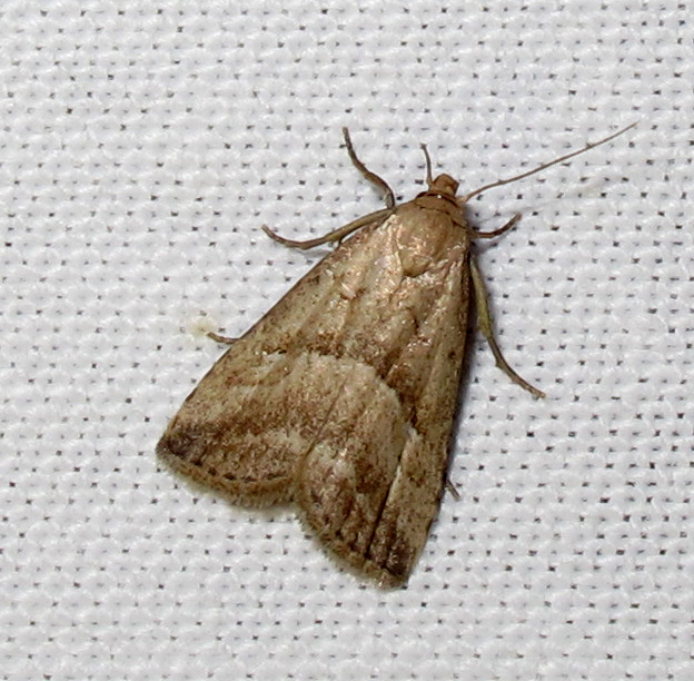 Hypenodes humidalis. Location: The Netherlands - Sallandse Heuvelrug - Noetselerveld en Sikkelbosch